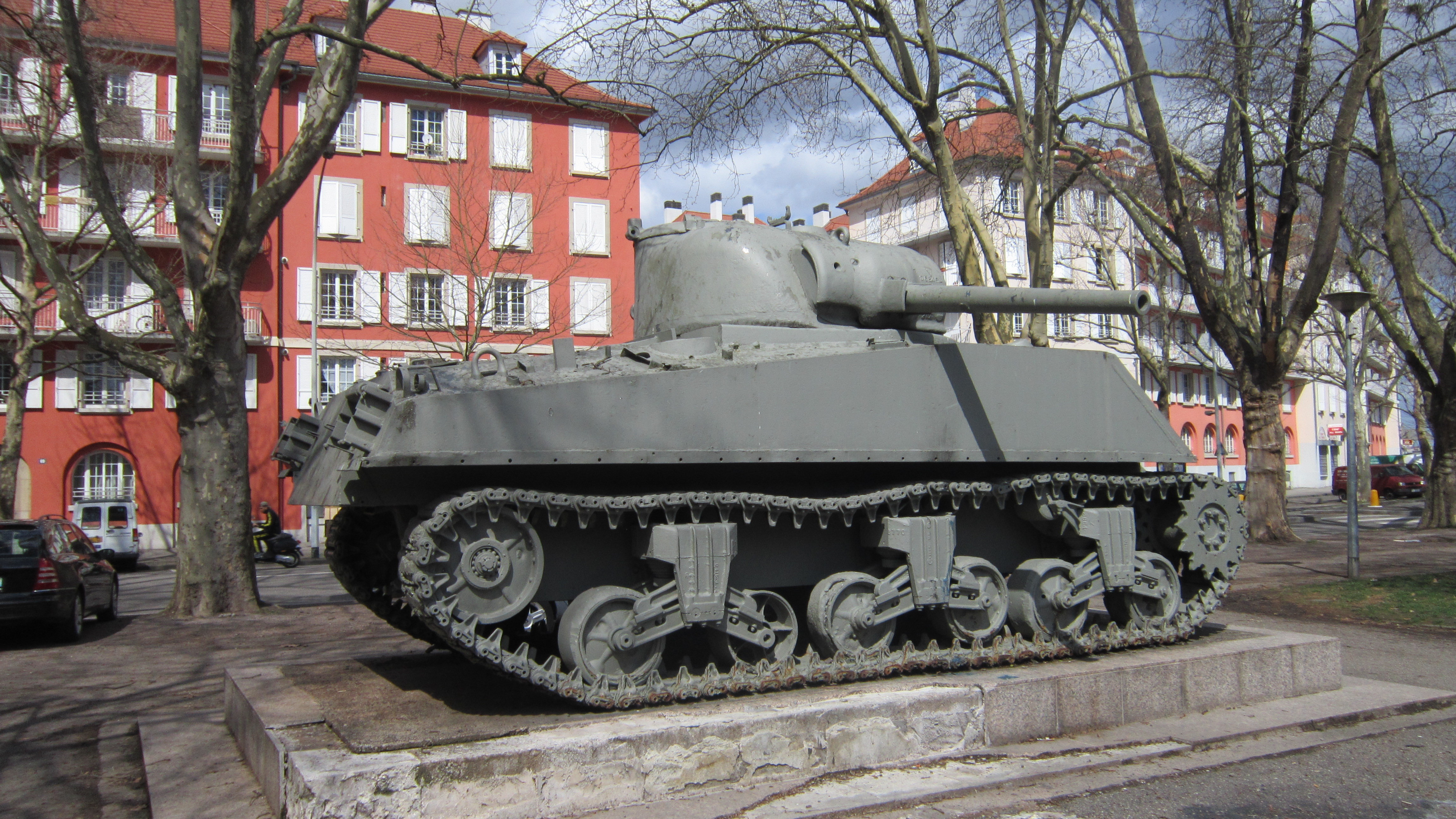 Char M4A3(75)W "Cherbourg" de la Seconde Guerre Mondiale exposé dans le quartier "Port du Rhin" de Strasbourg.